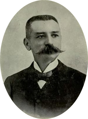 Pedro I de Serbia como rey.